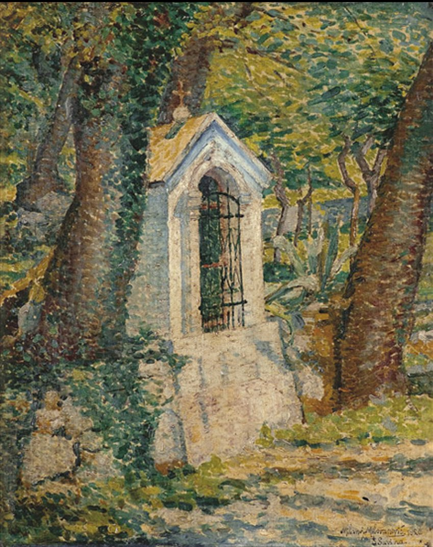 Фотографија слике Милан Миловановић: Параклис манастира Савине, 1920 година.